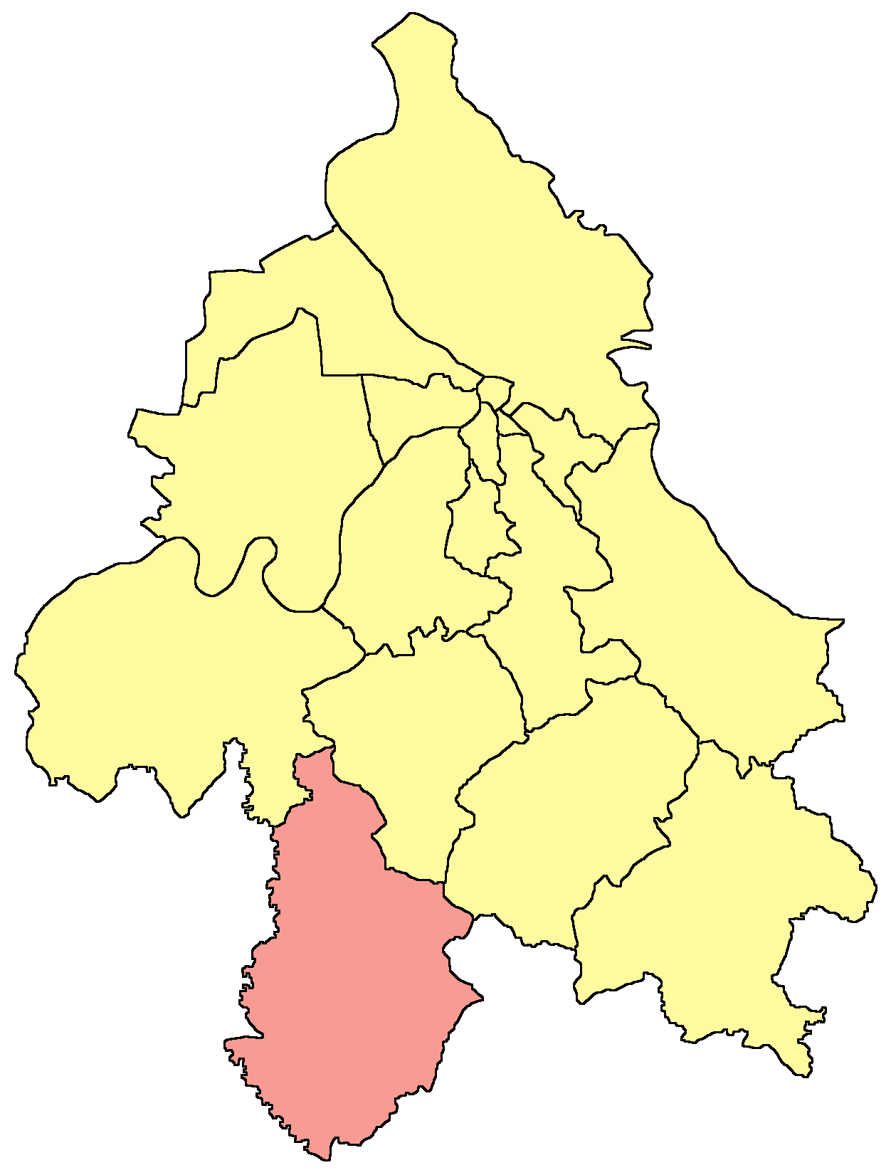 Belgrade municipality map